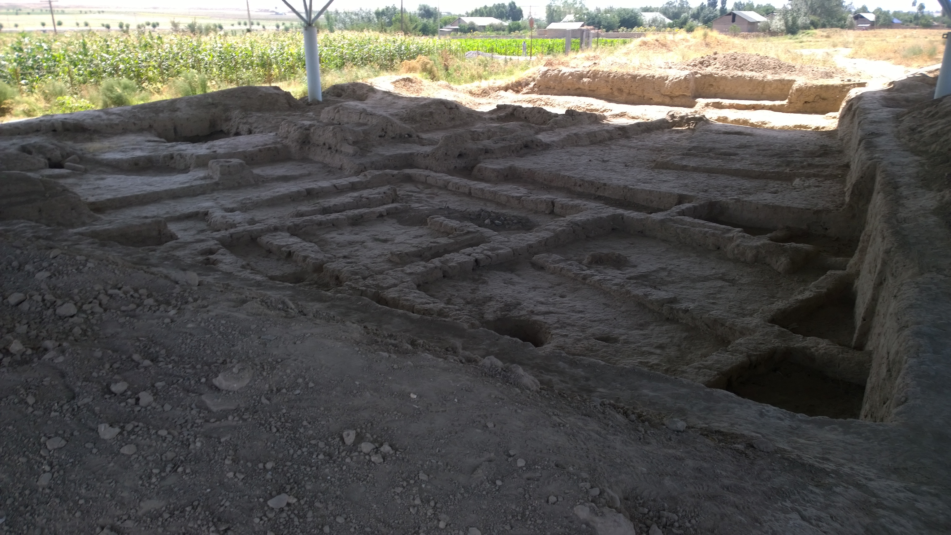 Тоҷикӣ: Саразм